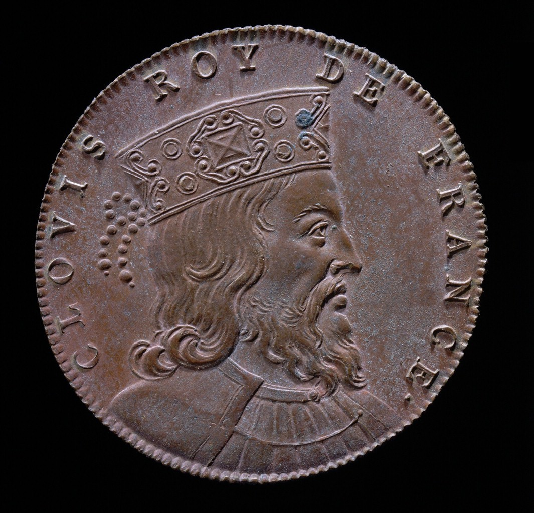 Clovis roy de France: [Buste du roi à droite ceint d'une couronne ressemblant à celle traditionnelle des barons français]